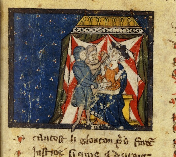 Français 1630, fol. 182, Assassinat de Sigebert Ier. Roman de Renart le contrefait. France, nord, après 1314.